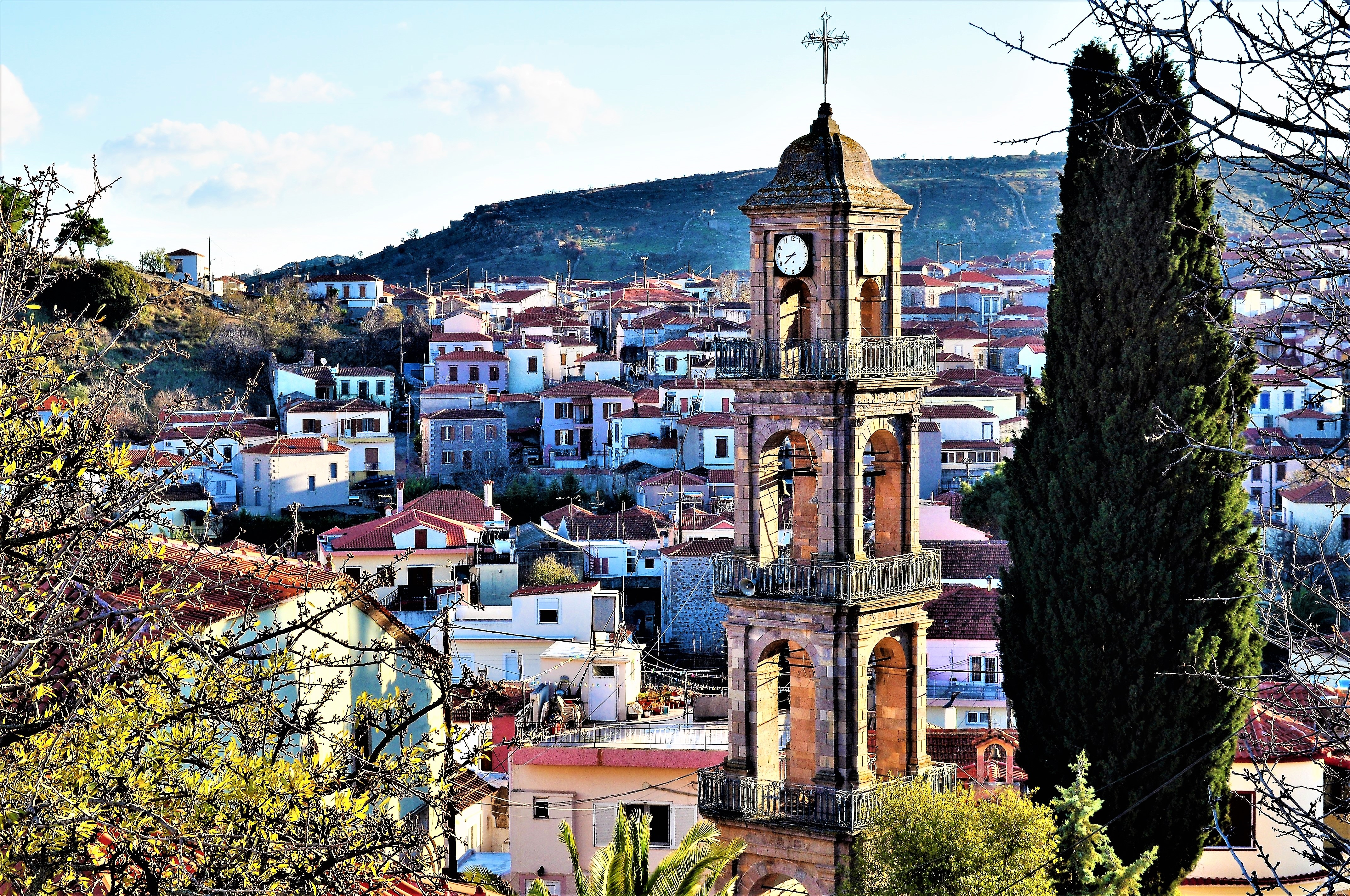 Χαρακτηριστική άποψη του Πολιχνίτου με το καμπαναριό του Αγίου Γεωργίου σε πρώτο πλάνο δίπλα στο ψηλό κυπαρίσσι και το χωριό στο βάθος.